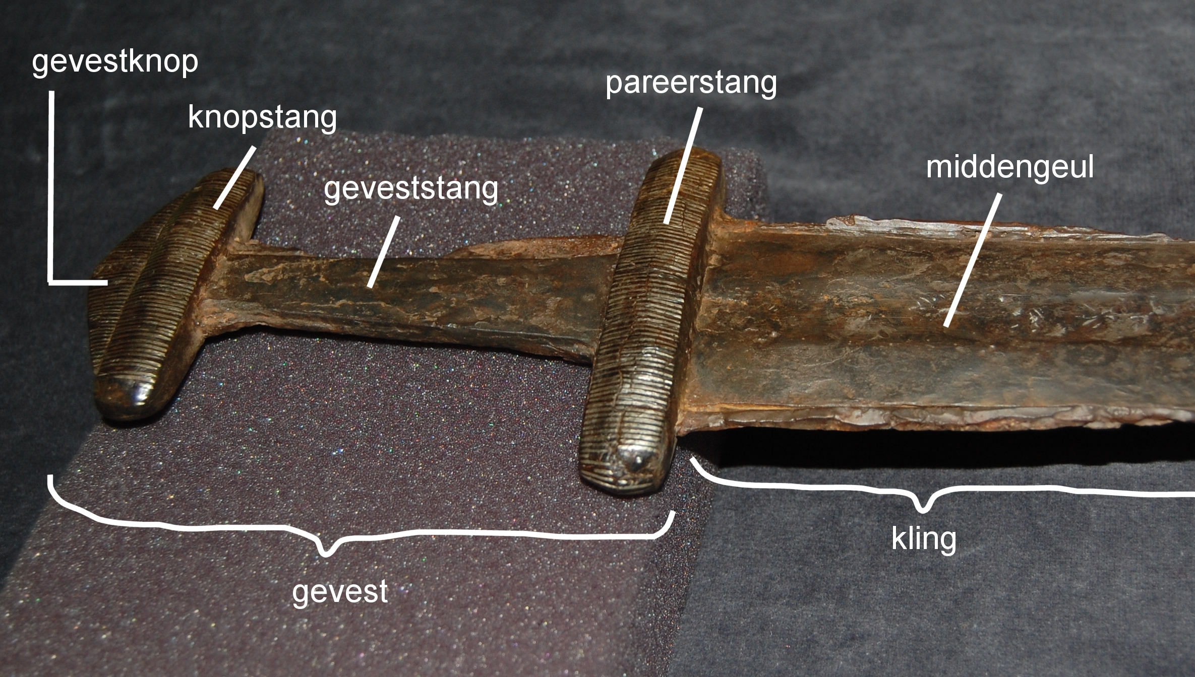 Onderdelen spatha Zwaard van Woerden, Bron E.M.P. Verhelst, Een vroegmiddeleeuwse begraafplaats in het castellum van Woerden. Een archeologische begeleiding conform protocol opgraven in het plangebied Appartementencomplex Hogewoerd, RAAP Archeologisch Adviesbureau BV, 2015